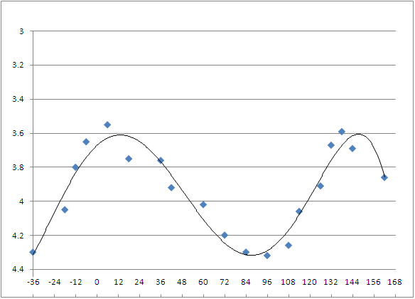 גרף של דרגת הבהירות של דלתא בקפאוס